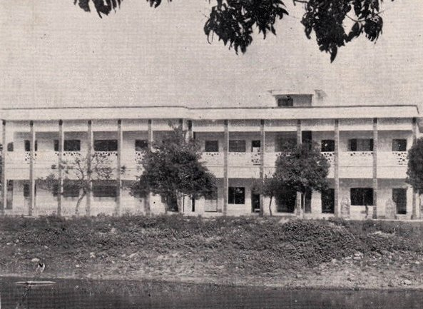 উলিপুর মহারাণী স্বর্ণময়ী উচ্চবিদ্যালয় ও কলেজের পুরোনো একাডেমিক ভবন।